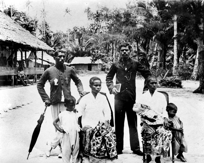 Repronegatief. Rooms-katholieke goeroe's (onderwijzers) met familie, Kai-eilanden.